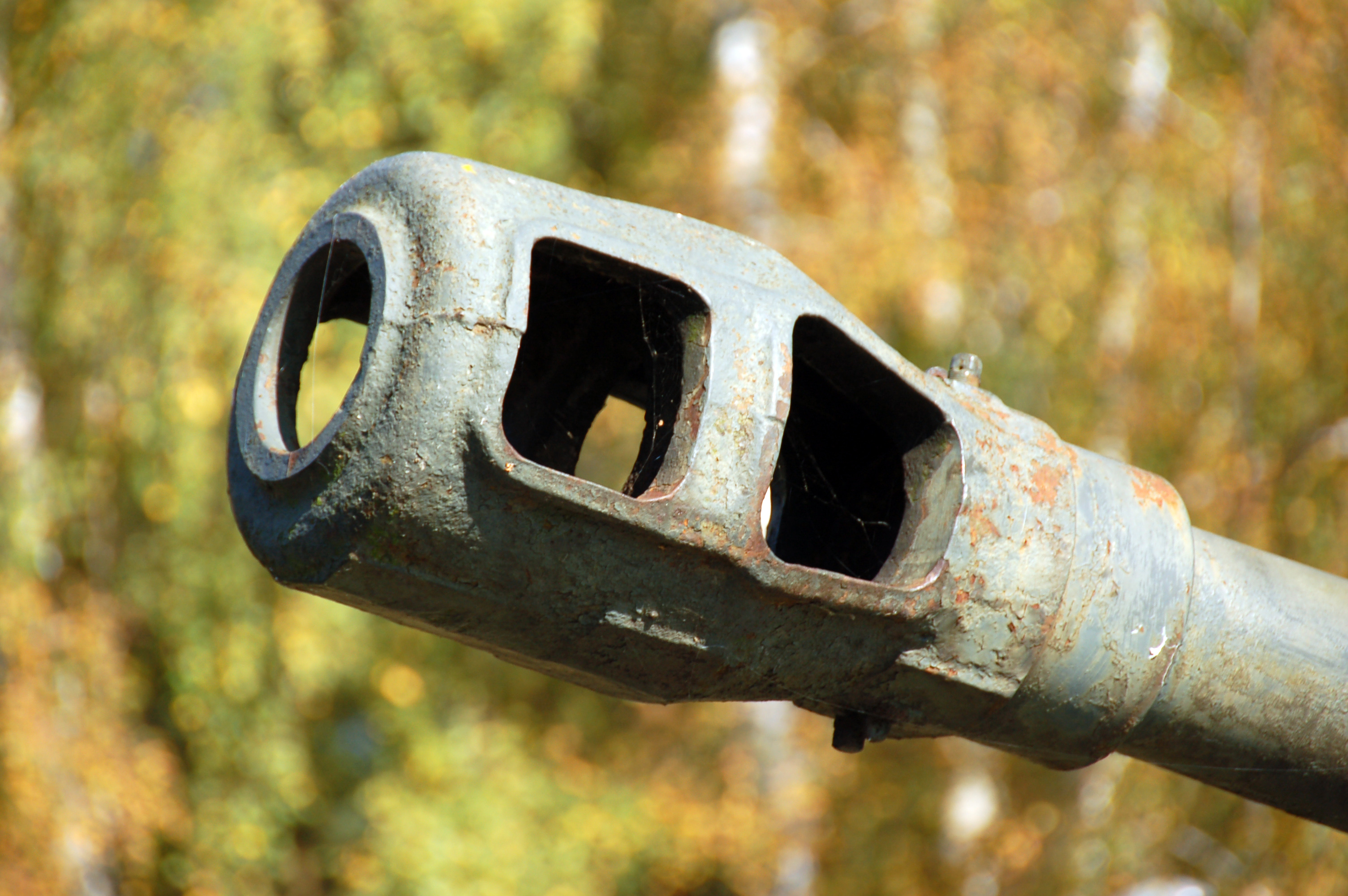 polnisches Oderbruch bei Siekierki polnischer IS-2